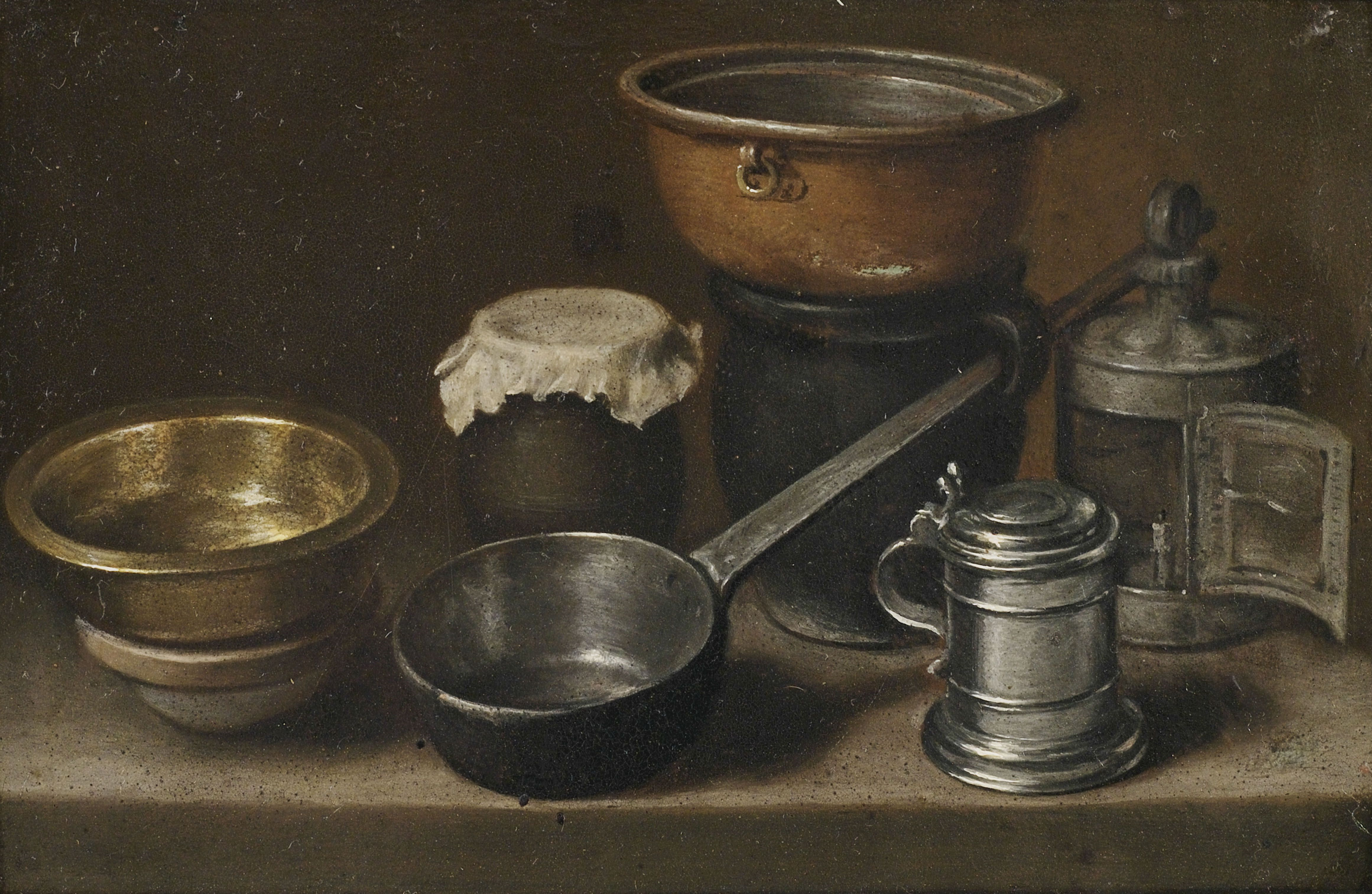 Pots et ustensiles de cuisine.